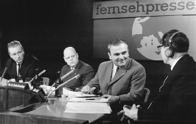 Berlin, DFF-Fernsehpressekonferenz Zentralbild-Spremberg 3.2.1971 Berlin: Fernsehpressekonferenz im II. Programm des DFF Eine Fernsehpressekonferenz mit aufschlußreichen Informationen über die Zusammenarbeit der imperialistischen Mächte gegen die Sowjetunion nach 1945 sendete der DFF am 3.2.1971. Gesprächspartner waren: Albert Janowitsch Balodis, Oberst der Sicherheitsorgane der Lettischen SSR (r.), Dr. Günter Leucht (2.v.r.): Prof. Dr. Stefan Doernberg, Direktor des Instituts für Zeitgeschichte (3.v.r.), und der Regisseur des Films "Rottenknechte", Frank Beyer (li). Abgebildete Personen: Beyer, Frank: Regisseur, DDR (GND 119217899) Doernberg, Stefan Prof. Dr.: Botschafter in Finnland, Institut für internationale Beziehungen, DDR